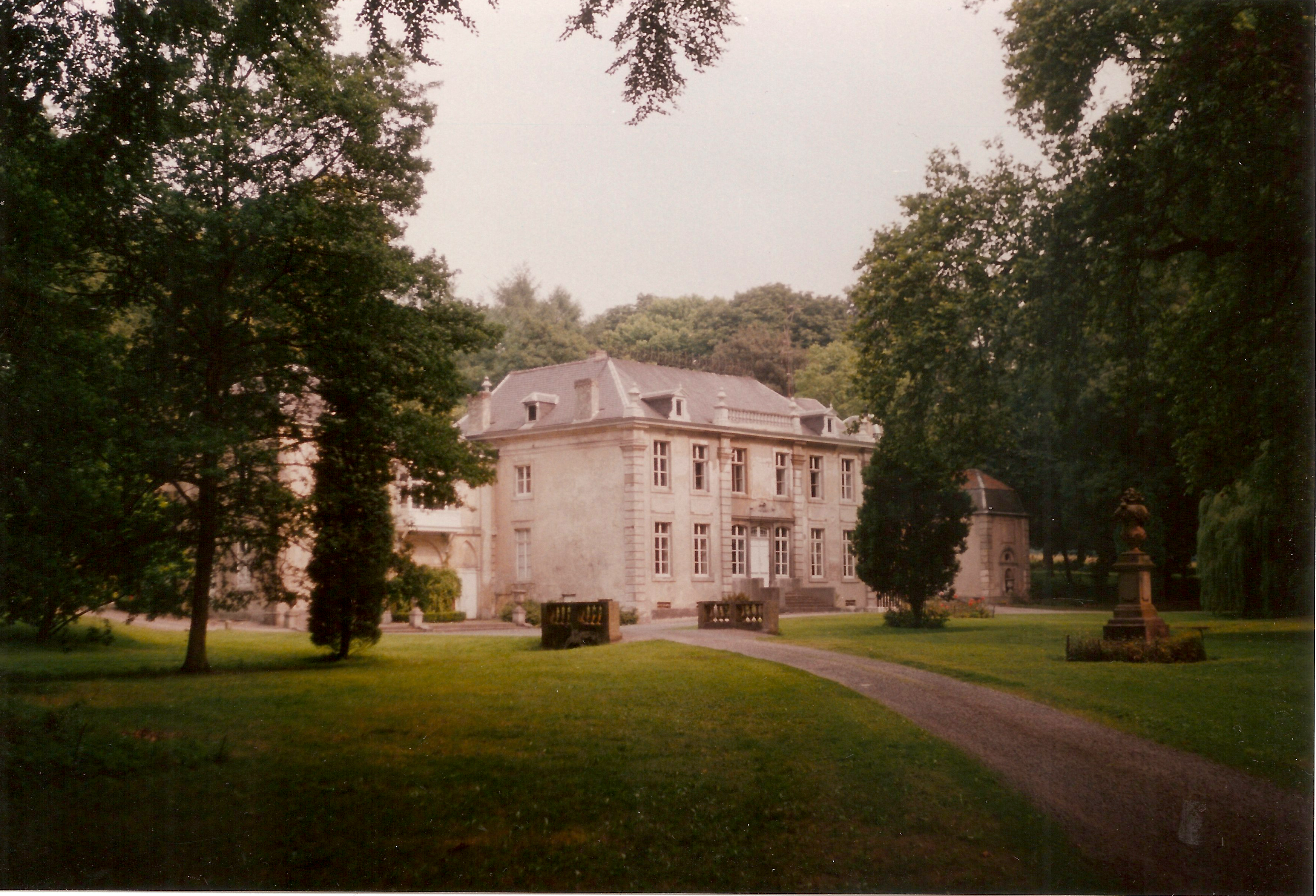 Le château de Fonteneau à Nivelles vers la fin des années 1980.